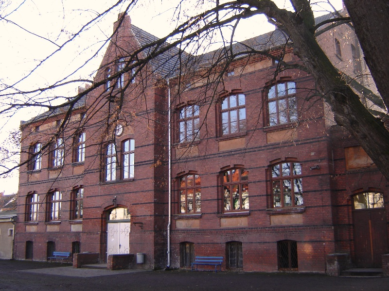 Schulgebäude Magdeburg-Olvenstedt